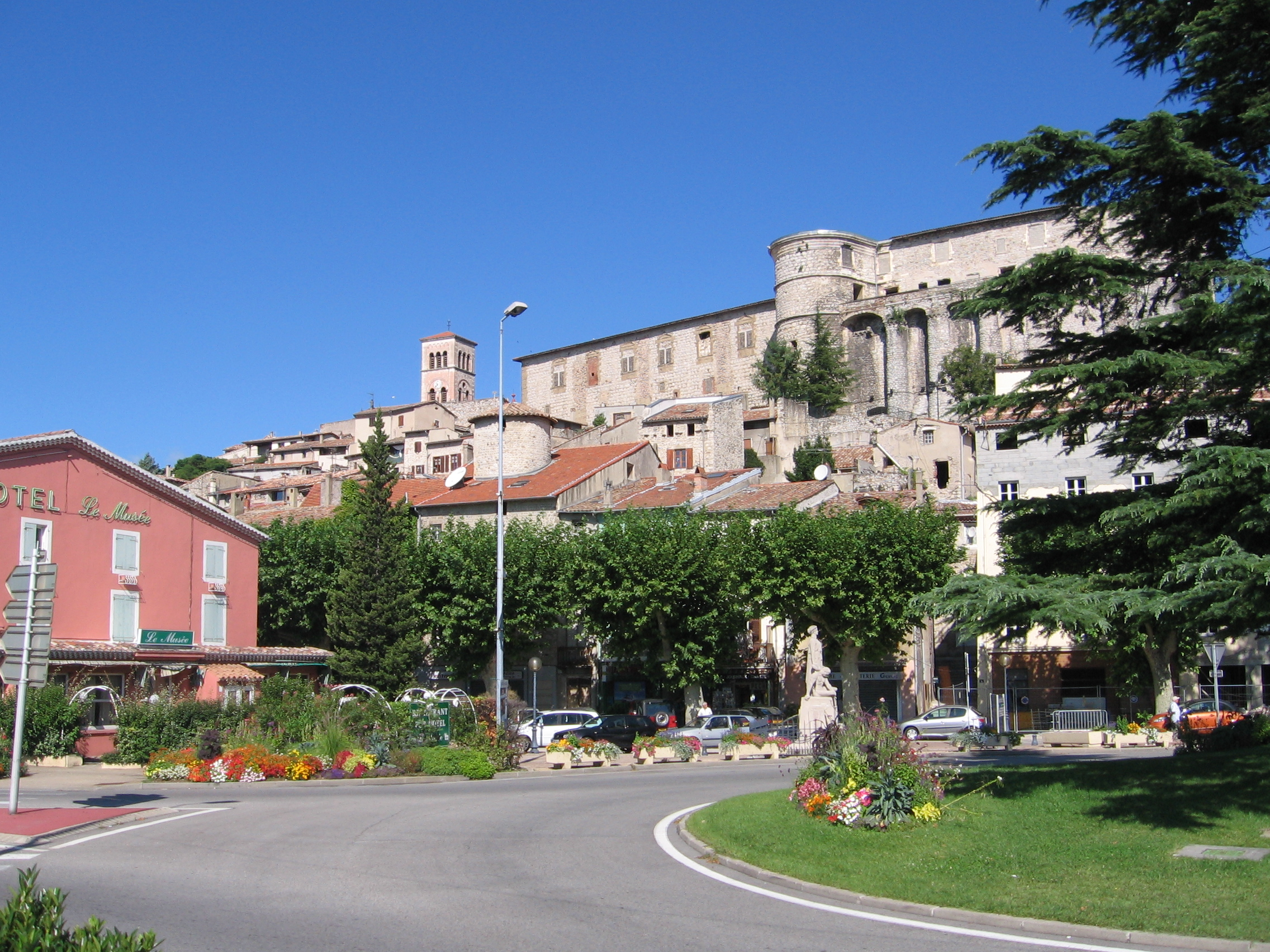 La Voulte-sur-Rhône, France